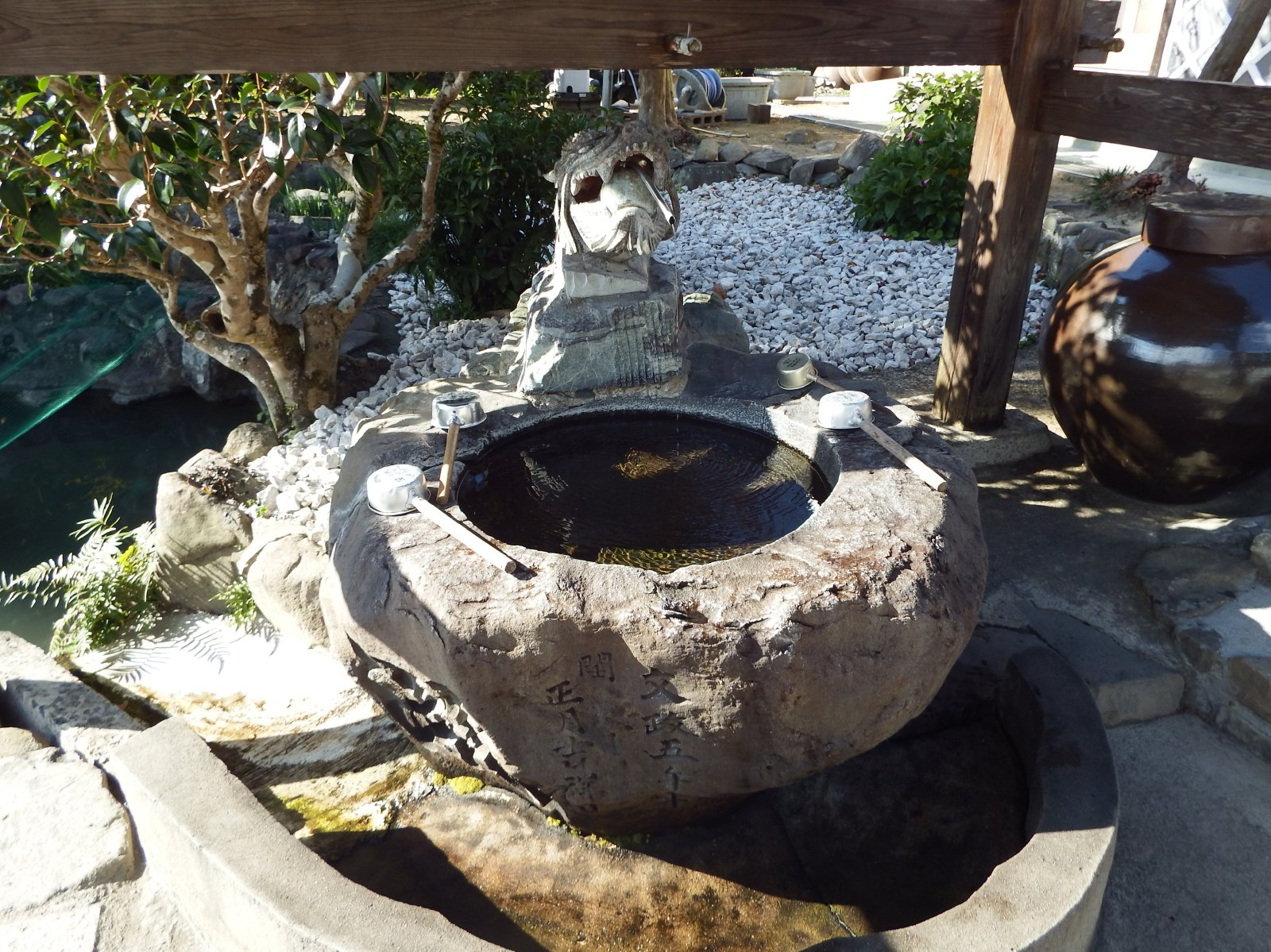 大日寺の手水舎